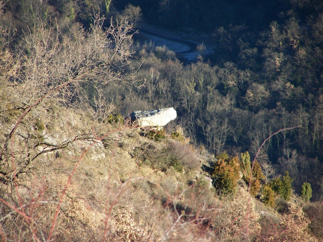 Dolmen de Lapège (Hypothèse bloc erratique)